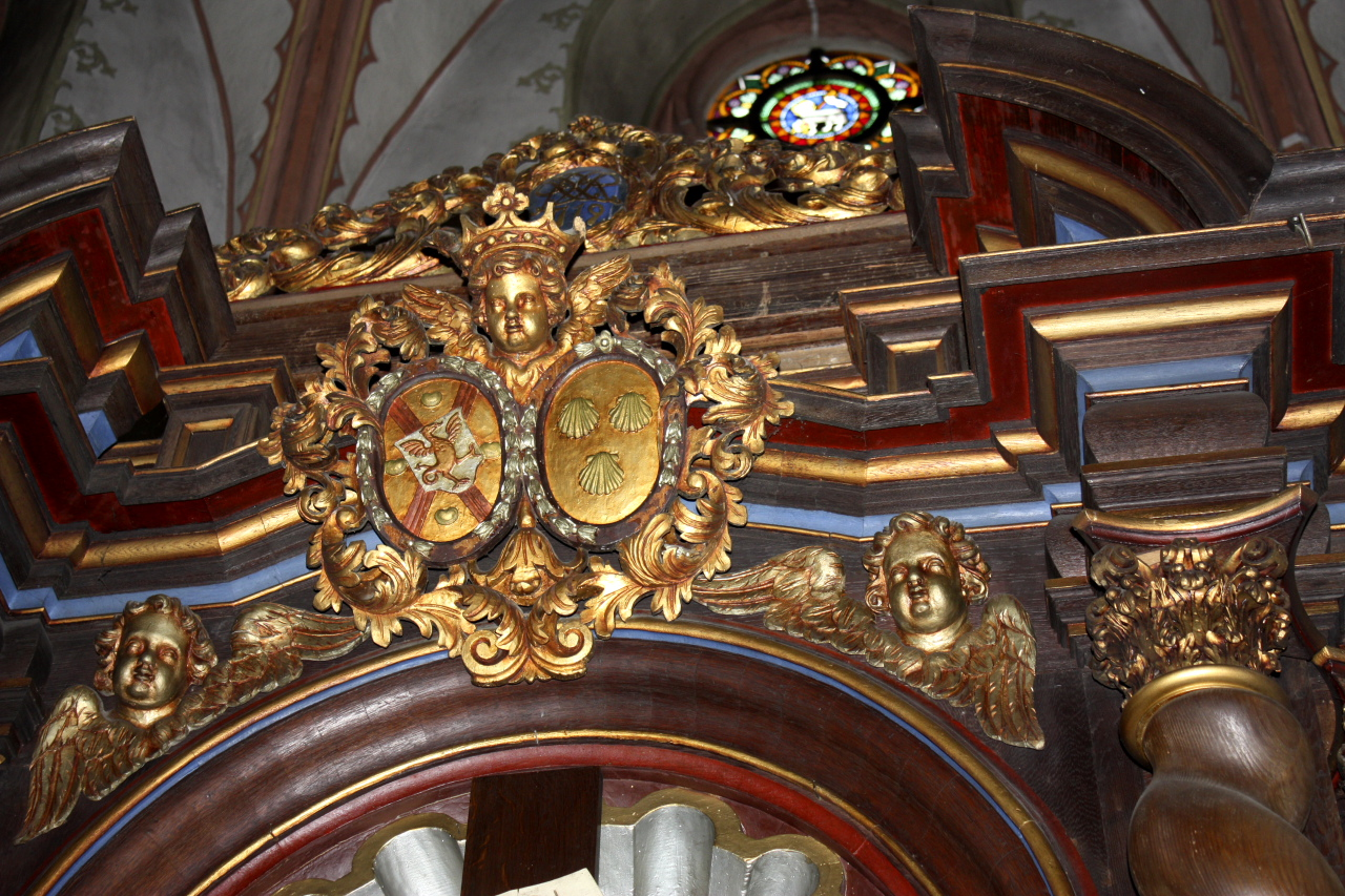 Ehewappen Kesselstatt-Metternich 1719 am Hauptaltar in St. Vitus Lösnich 2014